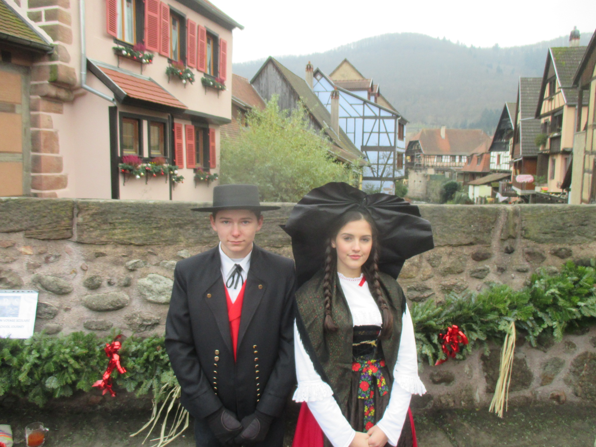 Marché de Noel de Kaysersberg